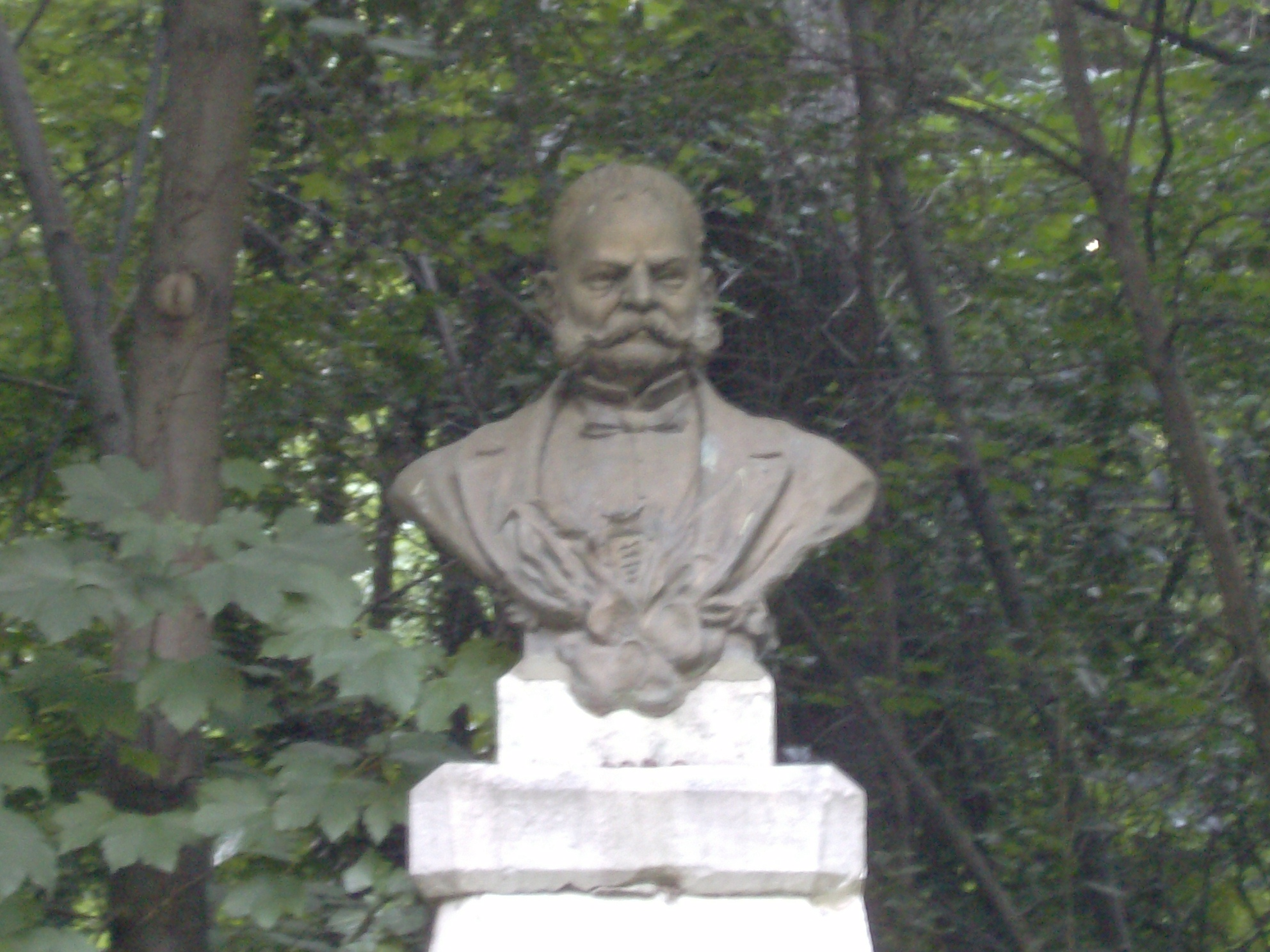 Busto de Miguel Iscar en el Campo Grande de Valladolid